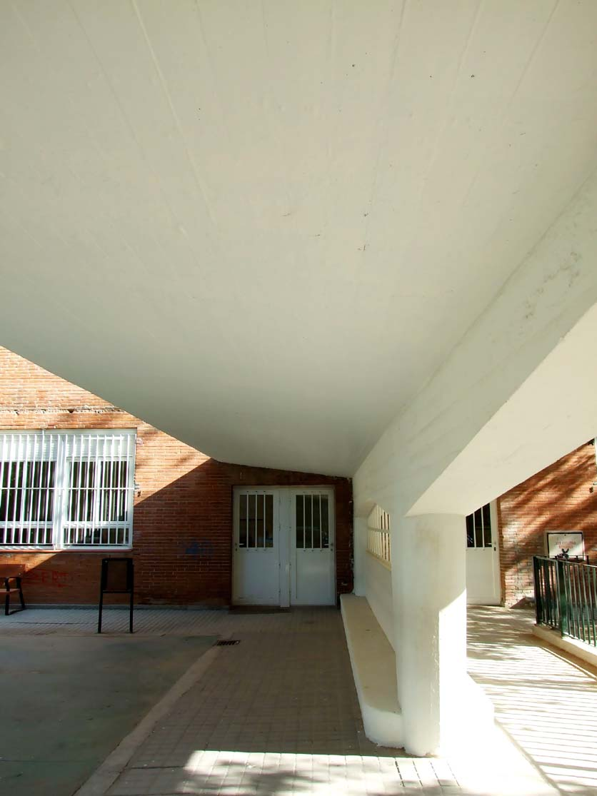 Marquesina futurista proyectada por el ingeniero Eduardo Torroja para las aulas de párvulos del Instituto Escuela (1933), en la actualidad Colegio Público Ramiro de Maeztu.